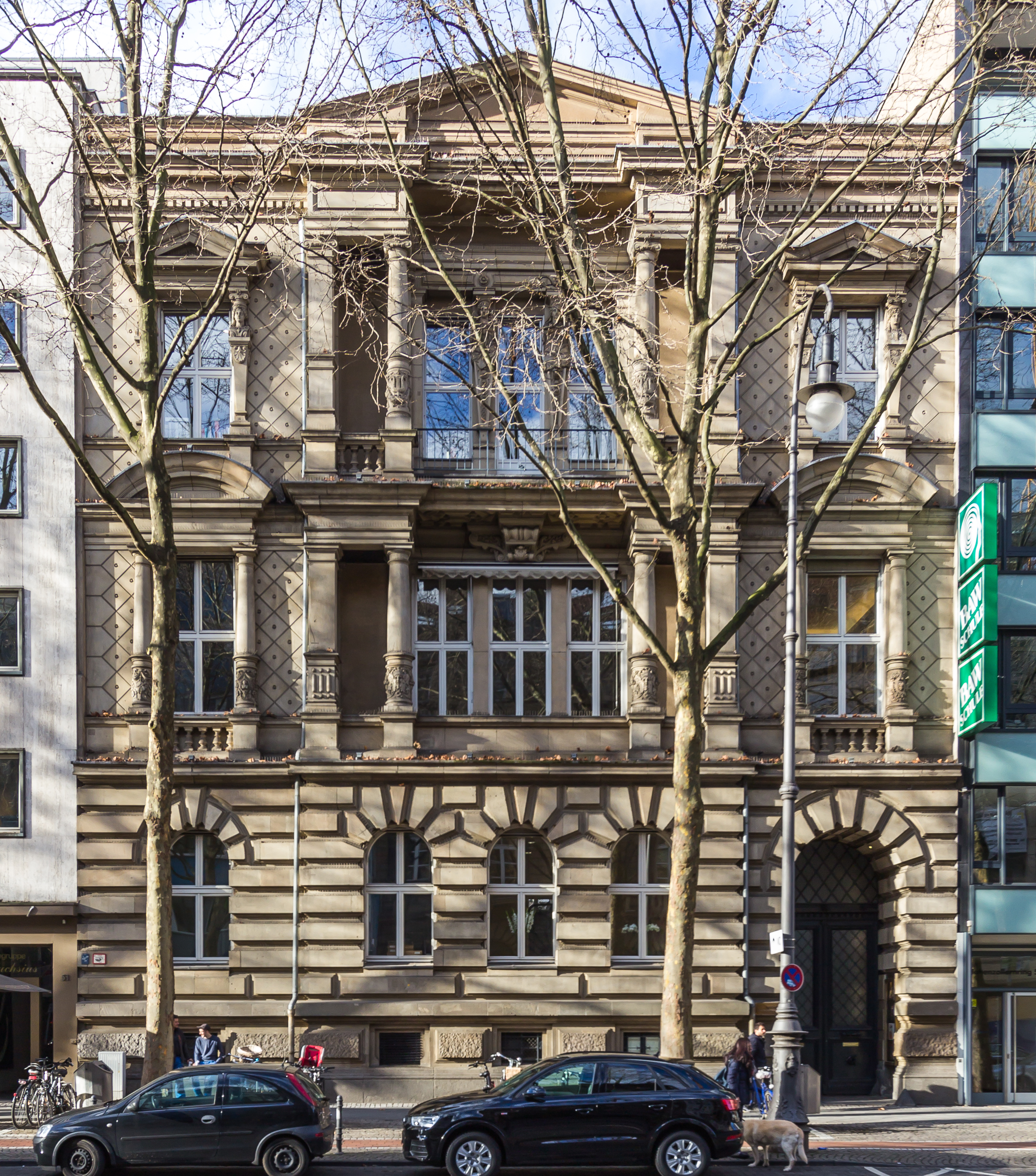 Bürohaus Hohenzollernring 53, Köln